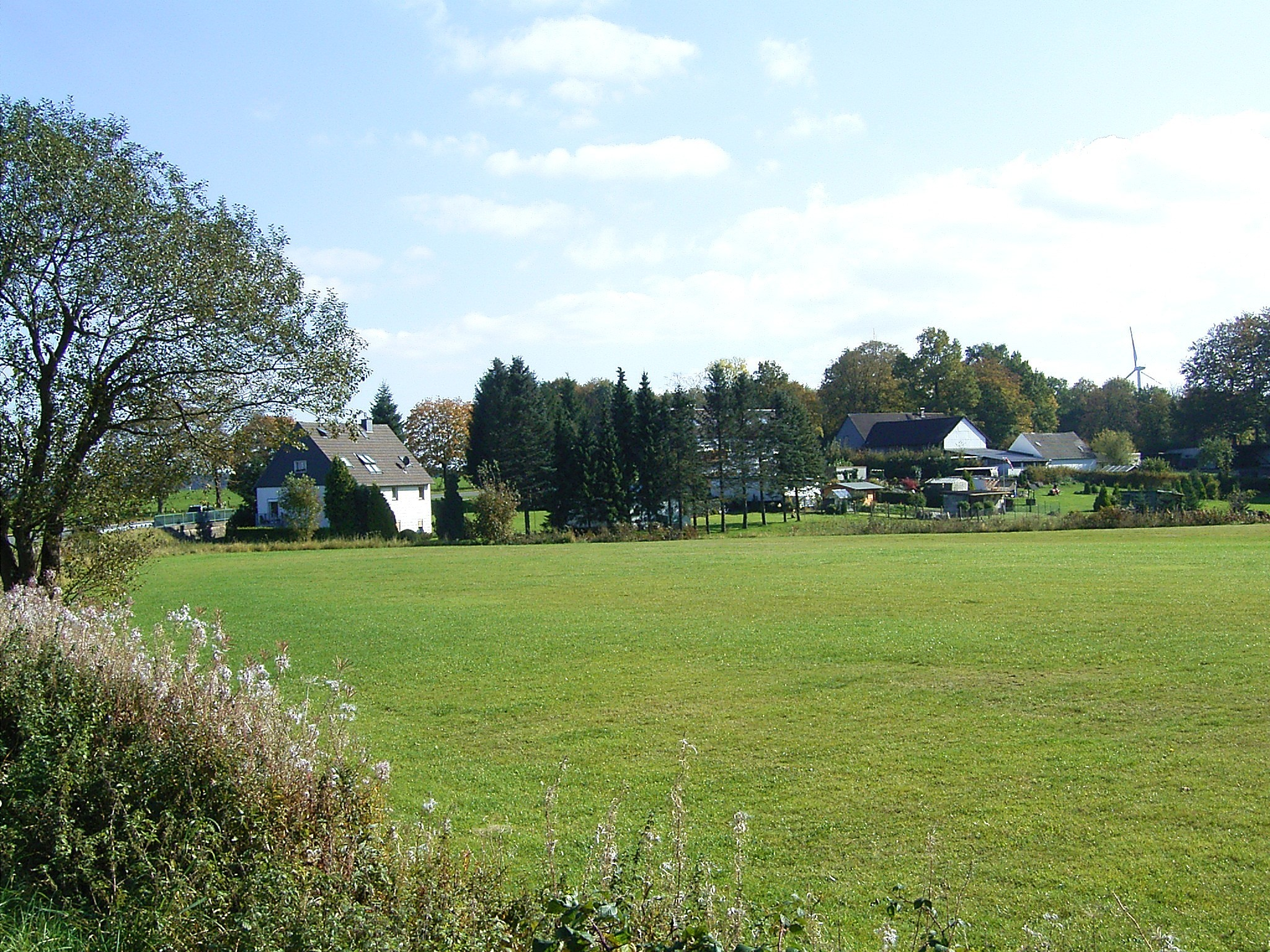 Radevormwald